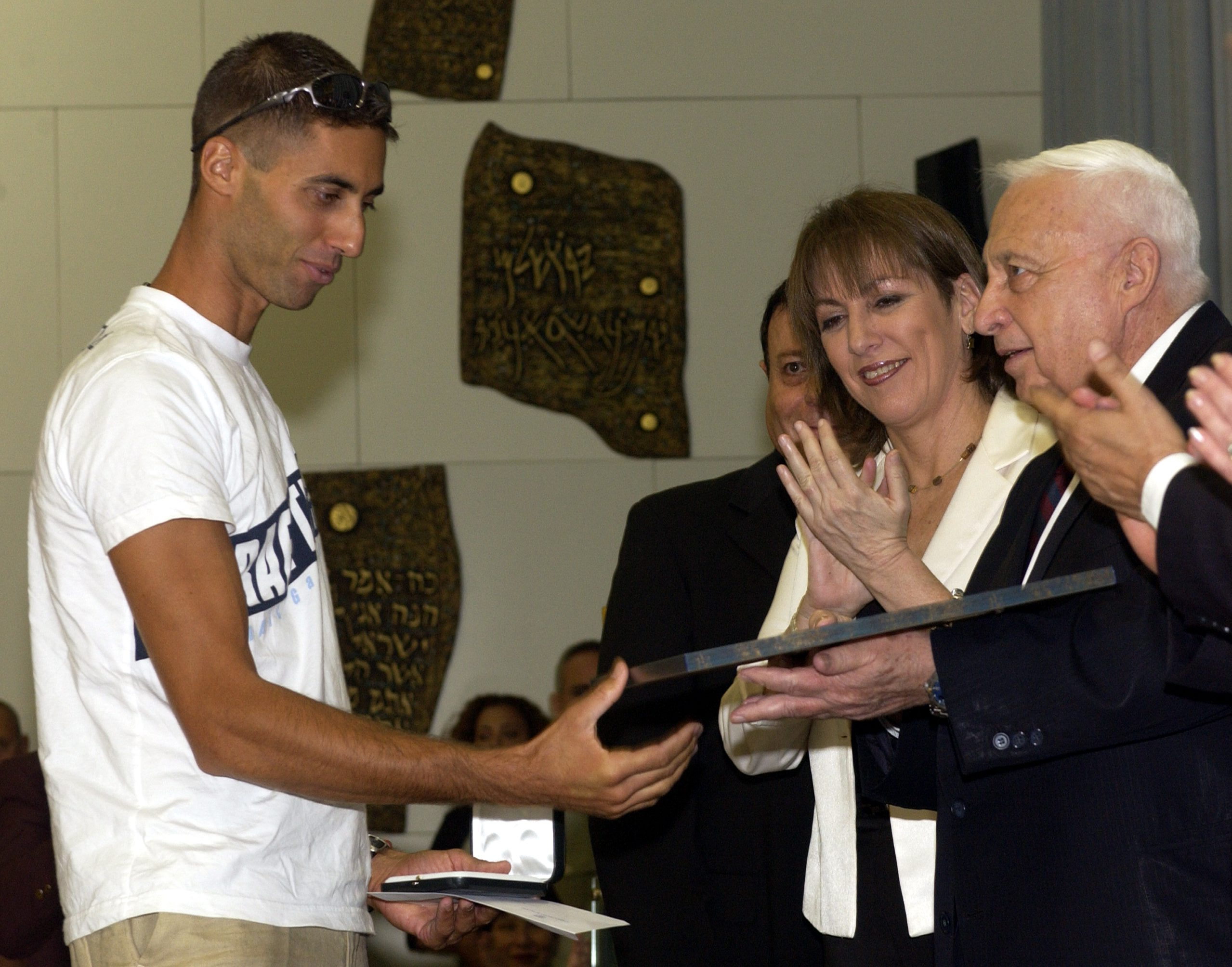 Windsurfer Gal Fridman receives a certificate from Prime Minister Ariel Sharon at a reception for the Olympic athletes’ return from the Athens 2004 Olympic Games at “Beit Hanassi” in Jerusalem. גל פרידמן, זוכה מדליית הזהב בגלישת רוח, וראש הממשלה אריאל שרון בקבלת הפנים שנערכה עבור הספורטאים שחזרו מאולימפיאדת אתונה 2004 בבית הנשיא בירושלים. Photo: OHAYON AVI, 05/09/2004.